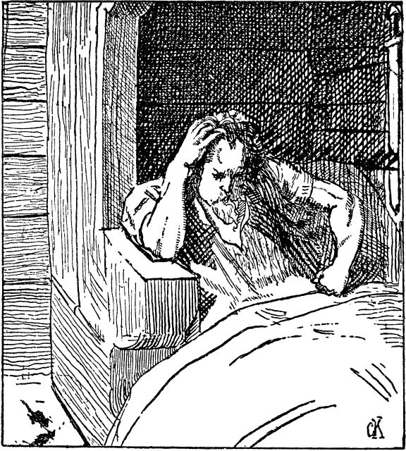 Christian Krogh: Illustration for Olav Tryggvasons saga, Heimskringla 1899-edition. nn: «Håkon jarl ligg til sengs og grundar.» nb: «Håkon jarl ligger til sengs og grunner.»